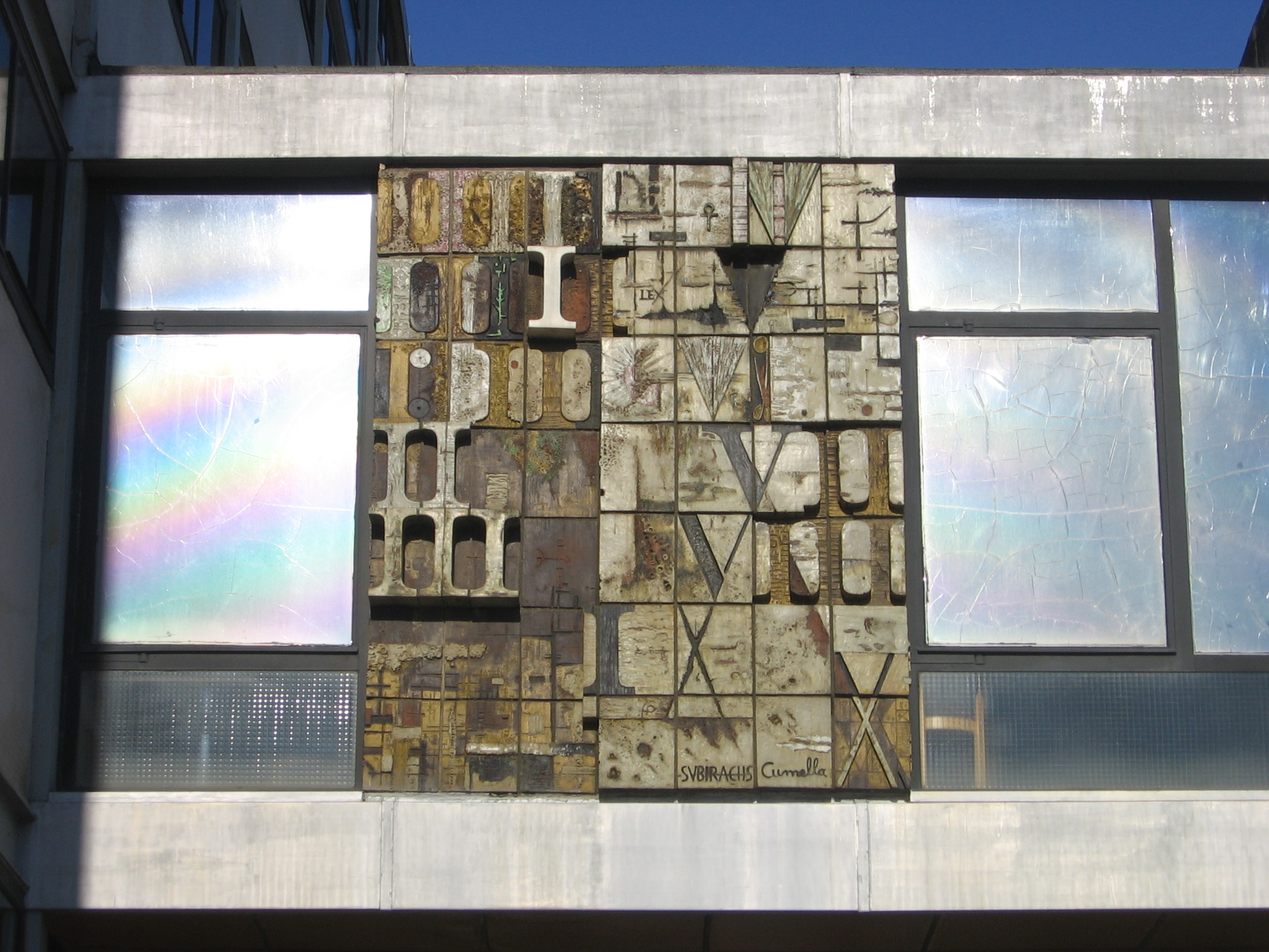 Las Tablas de la Ley, de Josep Maria Subirachs.